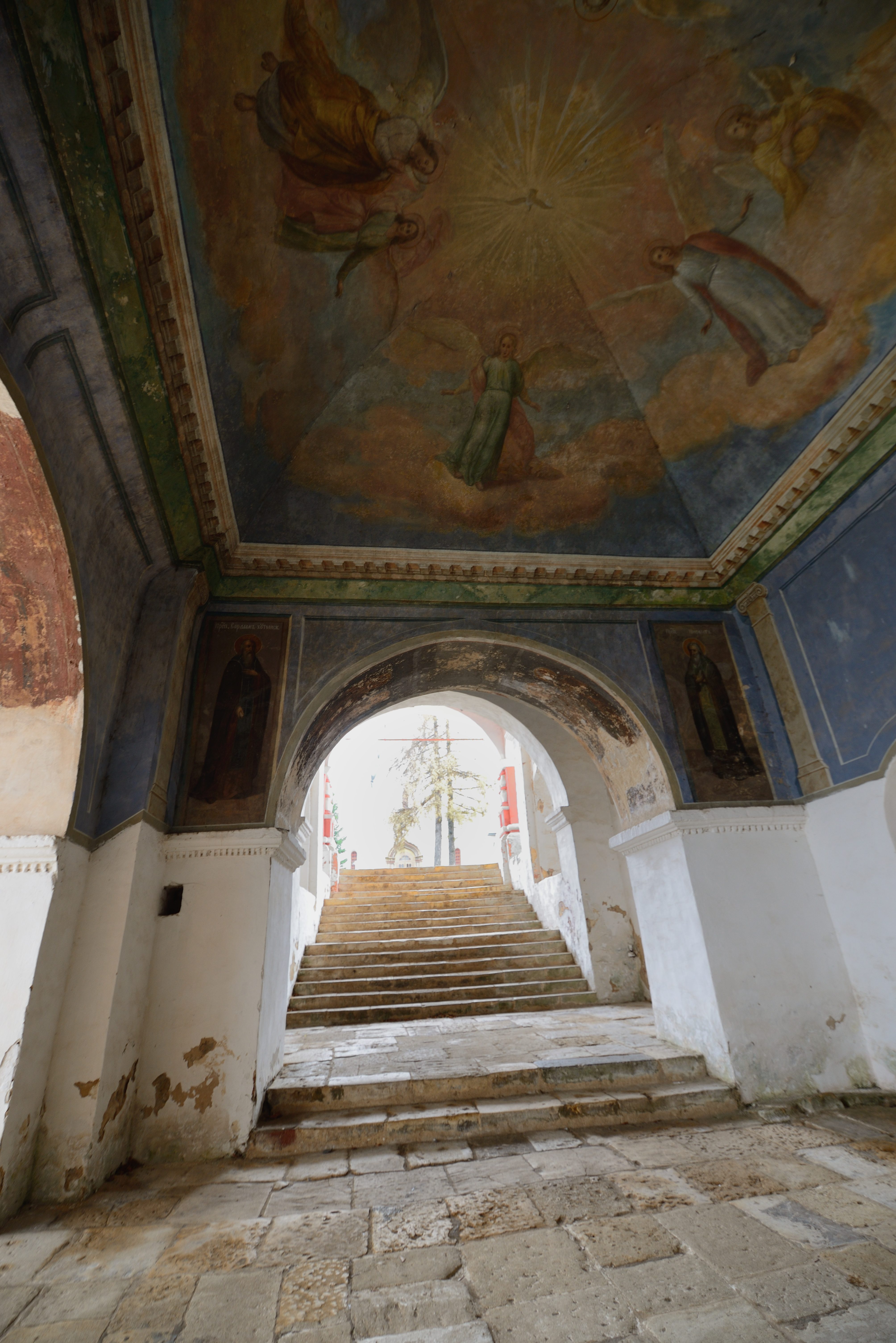 Подклет Троицкой надвратной церкви с лестницей ведущей на парадный двор Саввино-Сторожевского Ставропигиального мужского монастыря